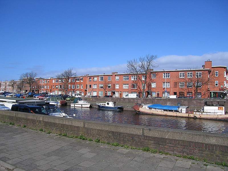 Soestdijksekade, wijk Rustenburg, tegenover het Zuiderpark, Den Haag, Netherlands